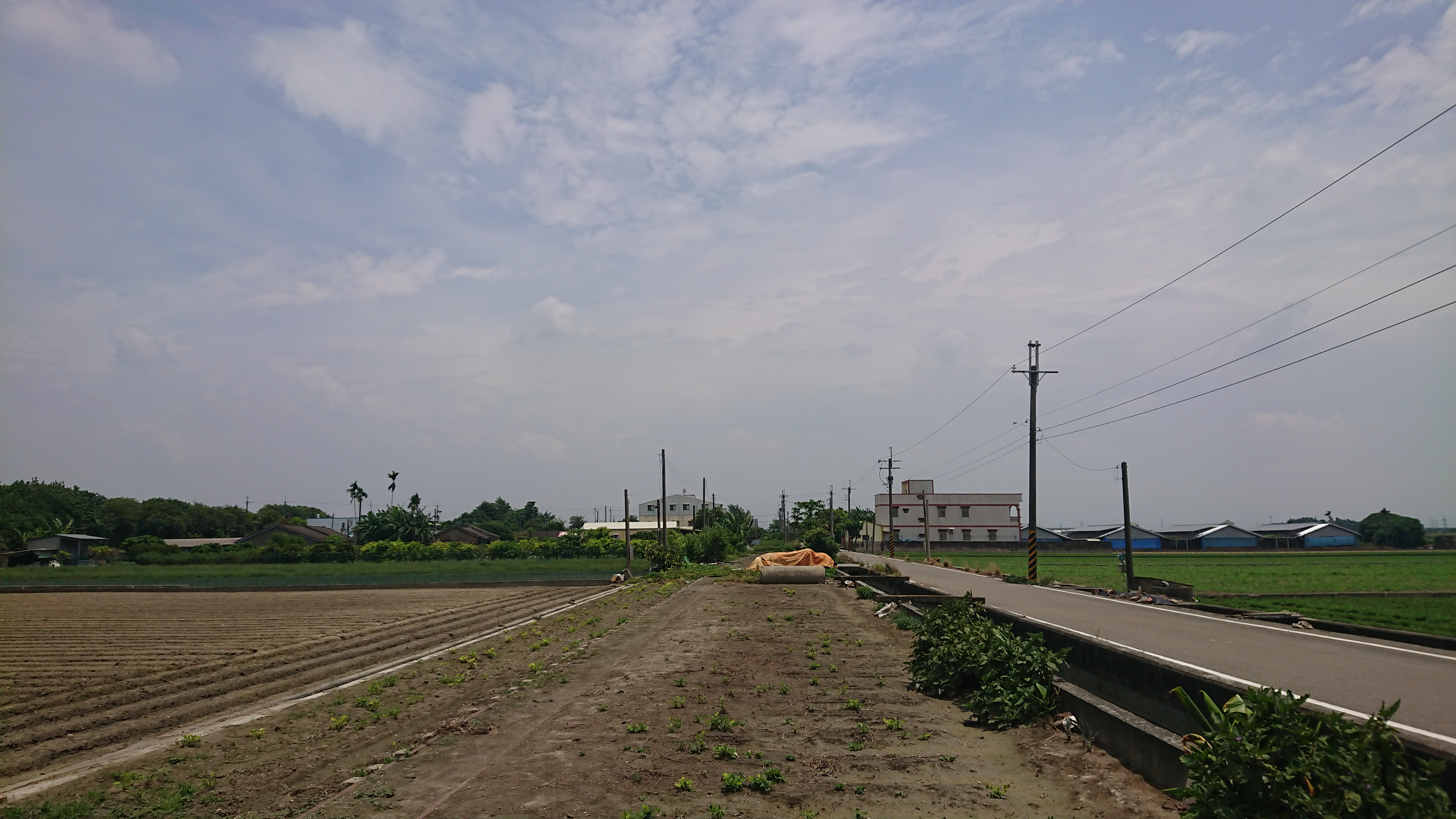 中文（台灣）: 下崁頂庄與糖鐵大荖線廢線跡